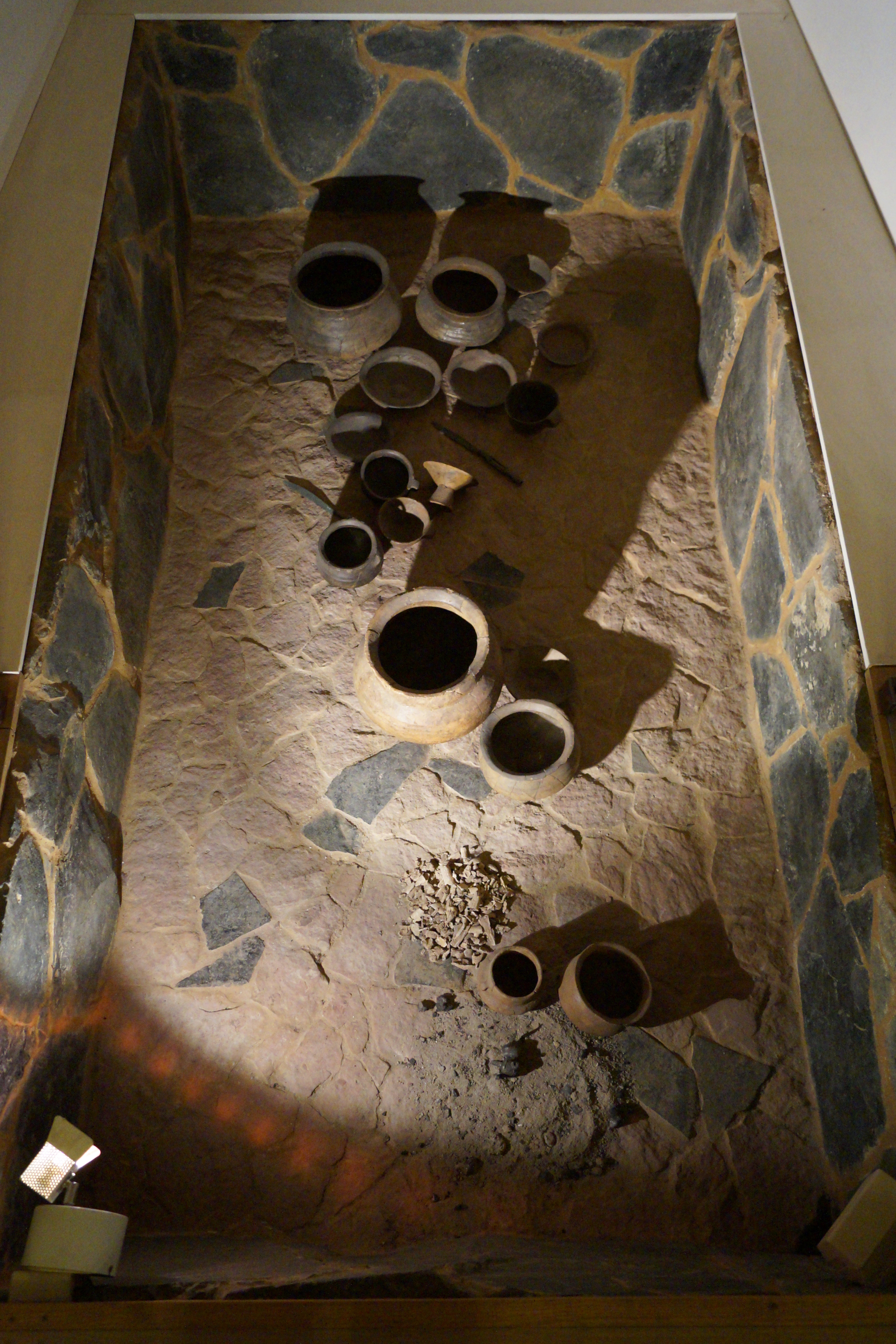 Steinkammergrab aus einem Gräberfeld der Bronzezeit im Bruchkoebeler Wald, geborgen beim Bau der Ausfahrt Hanau-Nord (A 66), Rekonstruktion im Museum Schloss Steinheim.